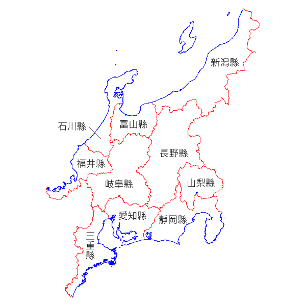 日本中部地方行政區域圖